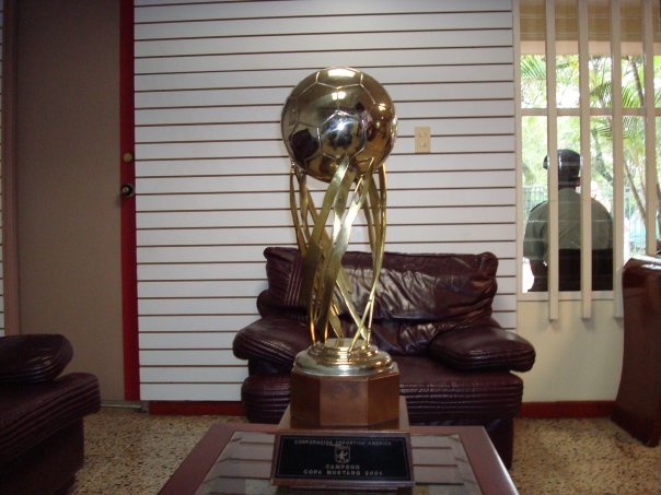 copa campeon 2001 America de Cali